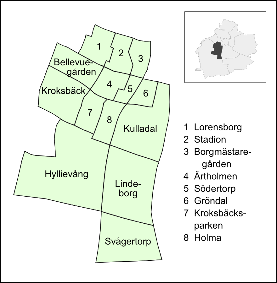 Delområden i Hyllie, Malmö 2009